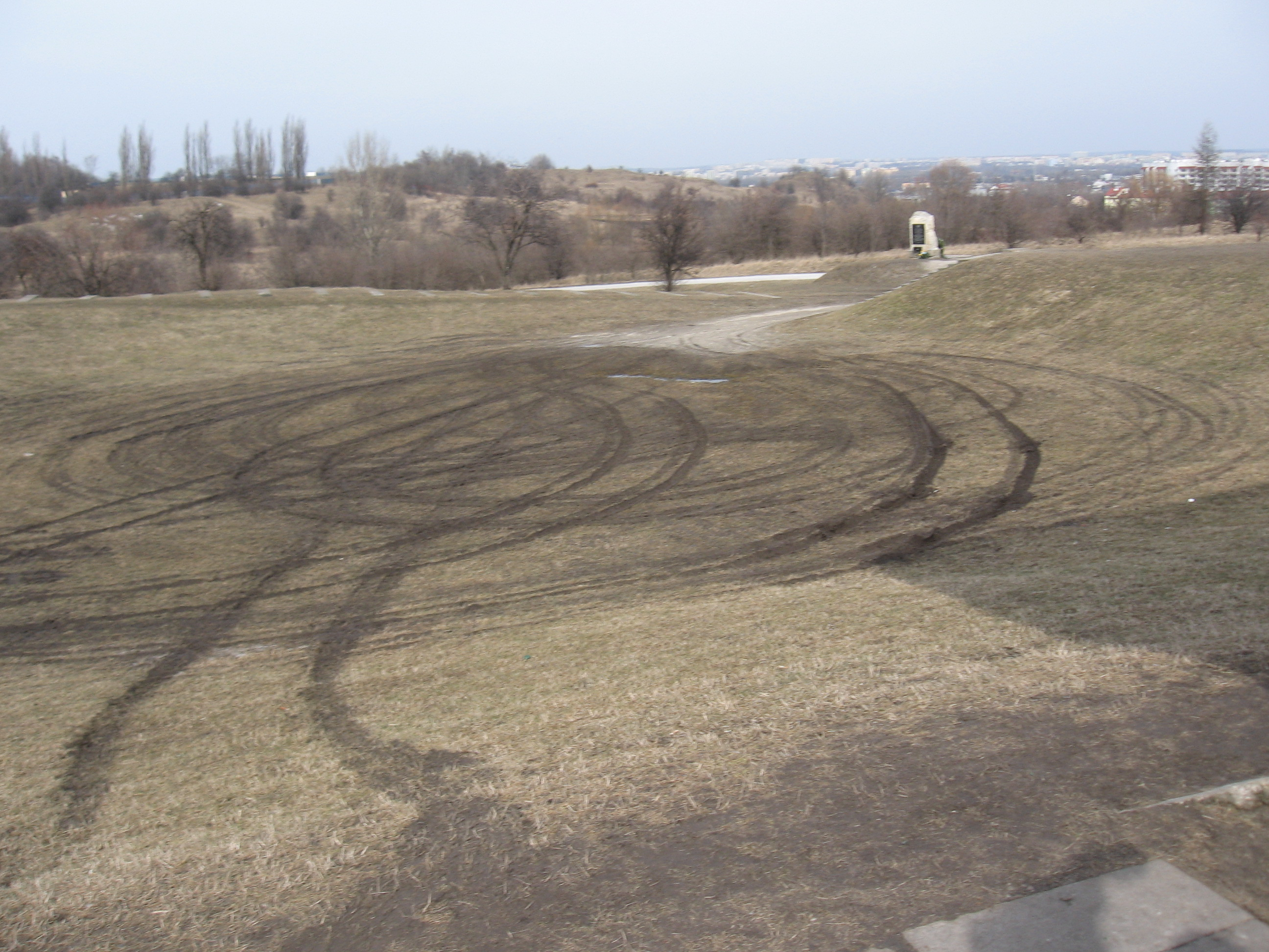 שטח מחנה פלשוב היום